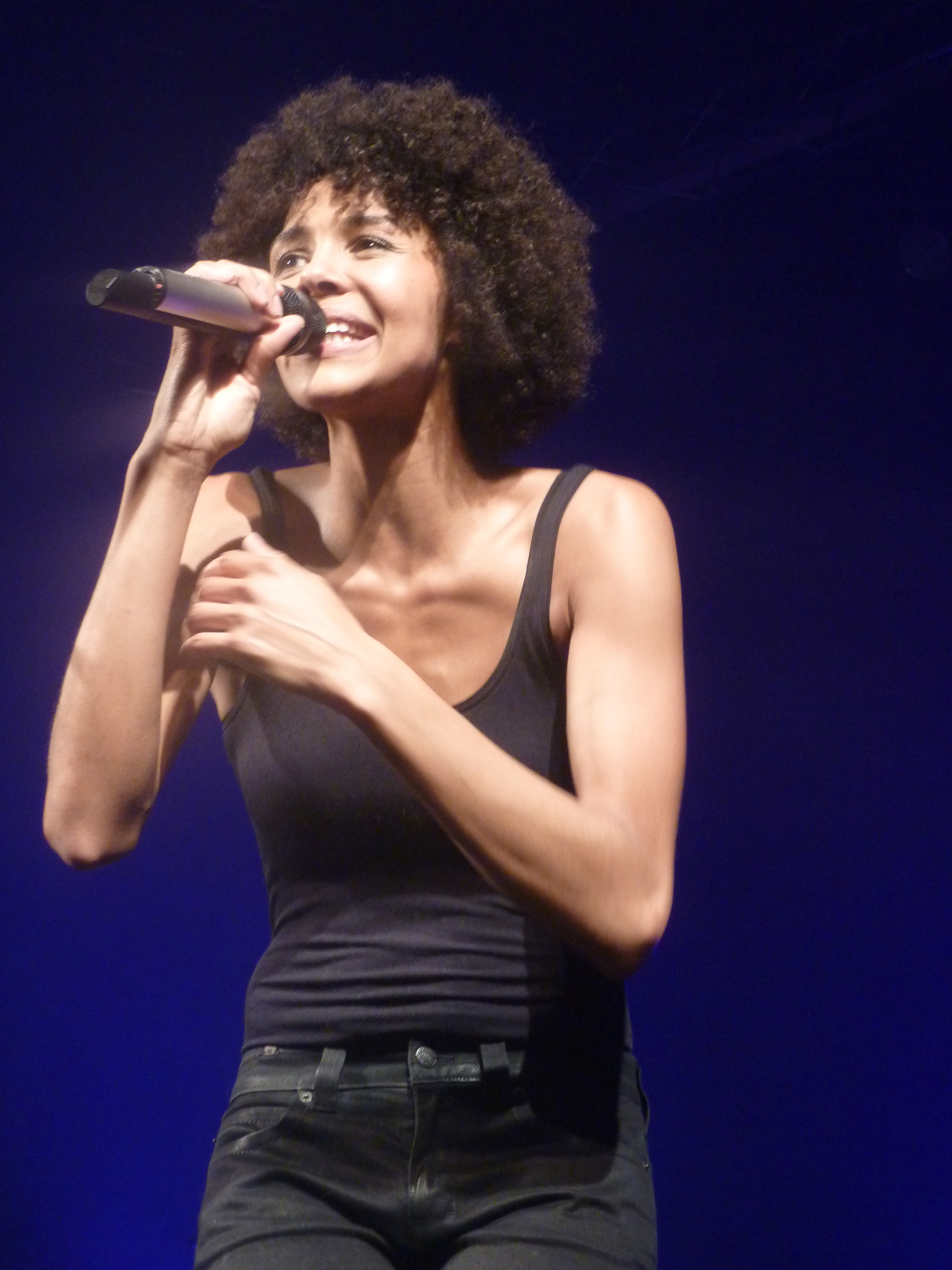 Ayo en concert au Trianon à Paris le 21 Mars 2011